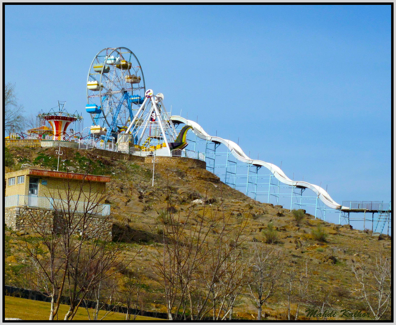 Park-e Bojeh (Women's Park), Khomein شهربازی پارک بوجه، خمین